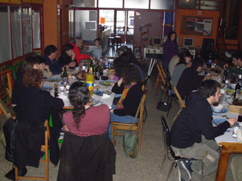 As actividades lúdicas son importantes nas programacións da Fundaçom Artábria. Na imaxe, xantar conmemorativo do Día das Letras Galegas, en maio de 2007.